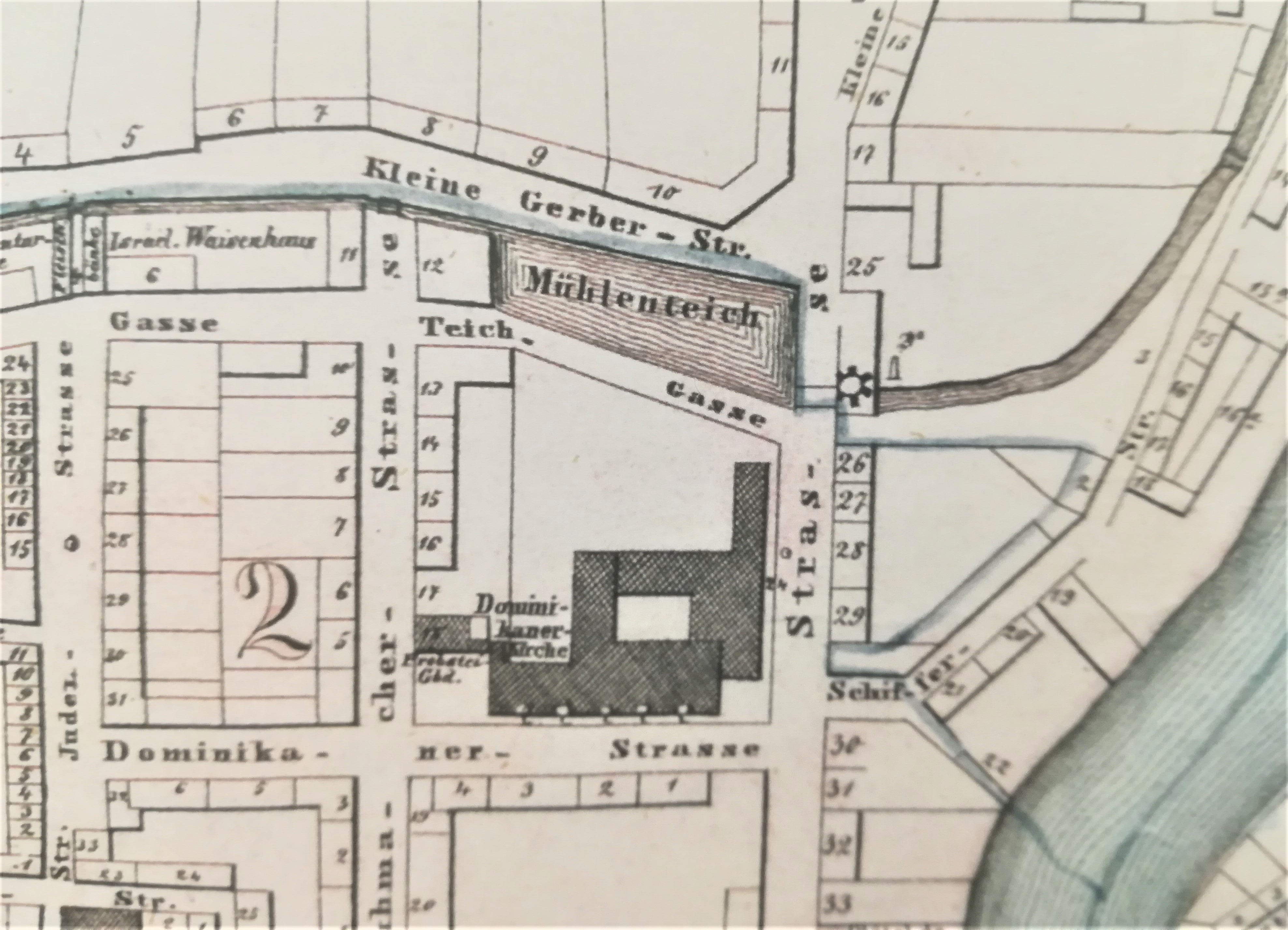 Mapa Corvinusa - Poznań 1856 r. Klasztor Dominikanów, Garbary i Staw Młyński.